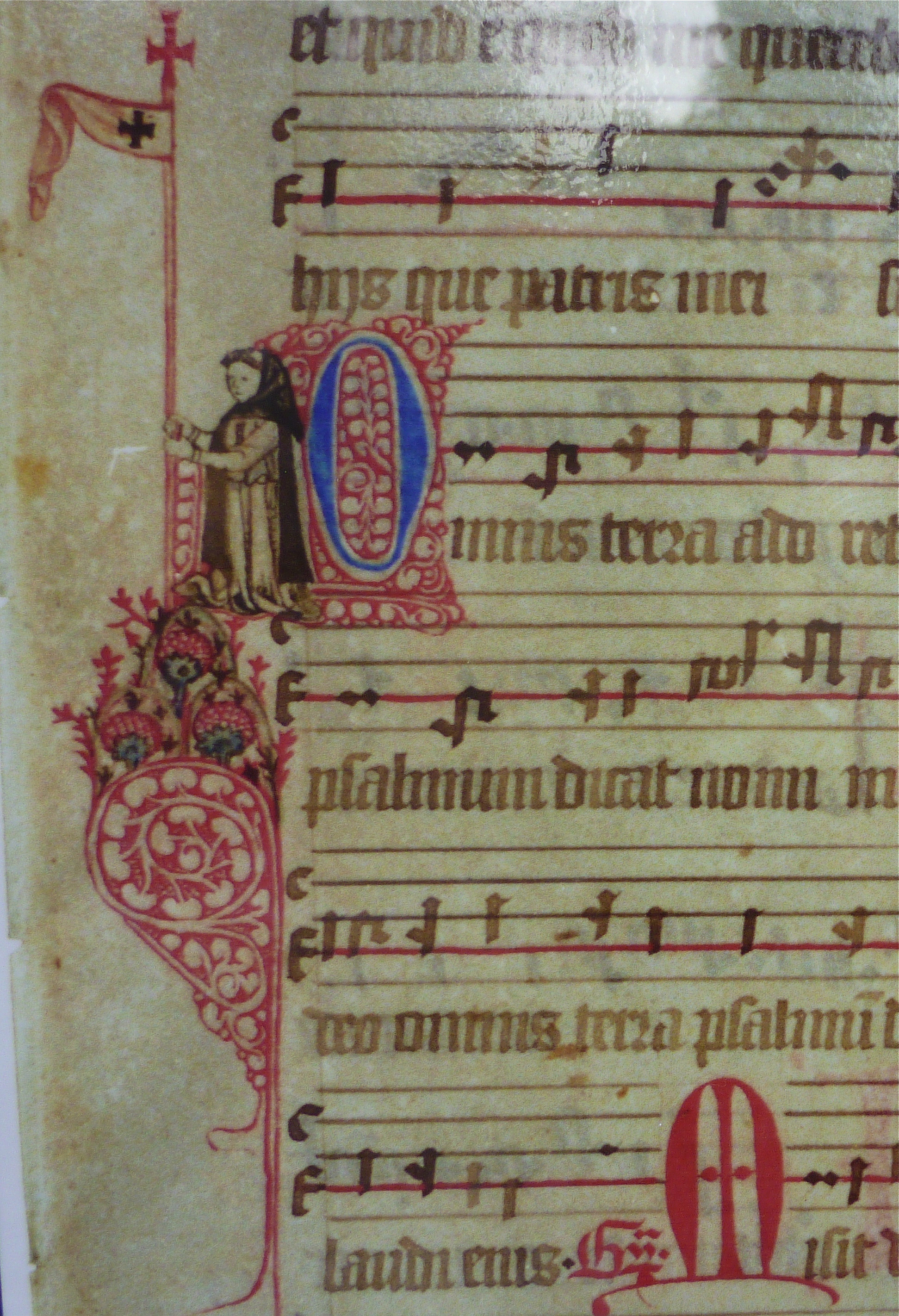 Kloster Beerenberg bei Winterthur-Wülflingen Choralbuch mit bildlicher Darstellung des Beerenbergs